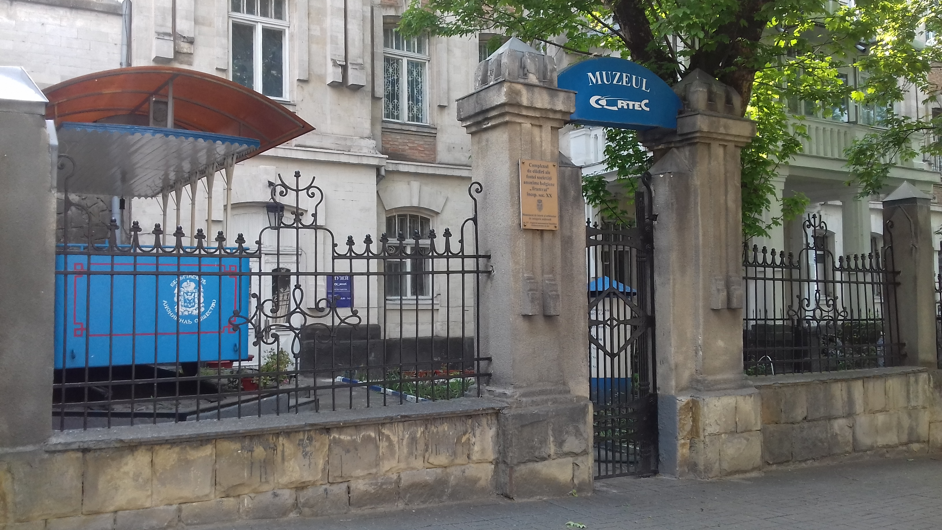 Музей Кишинёв